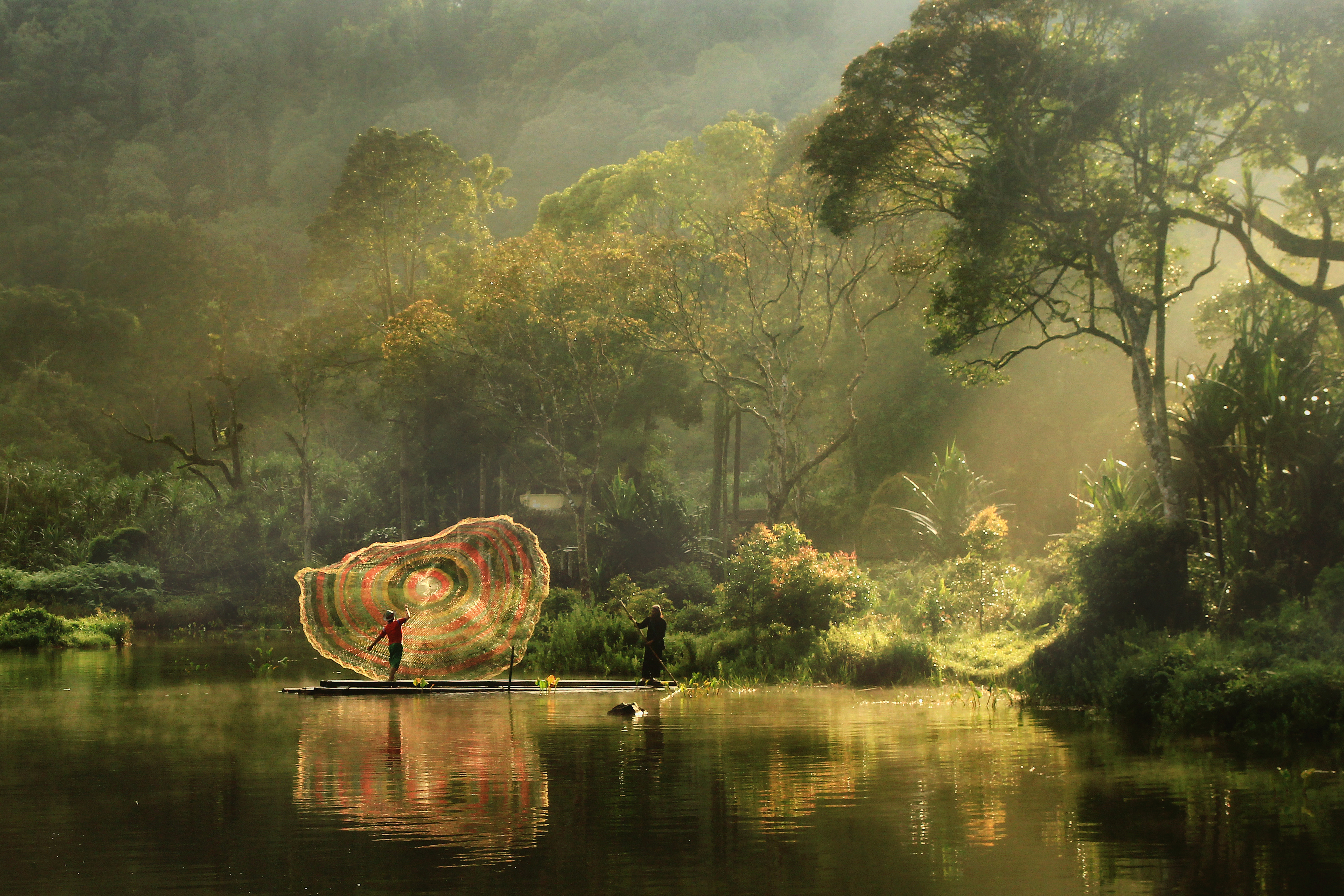 Pagi di situ gunung menghadirkan pemandangan yang sangat indah